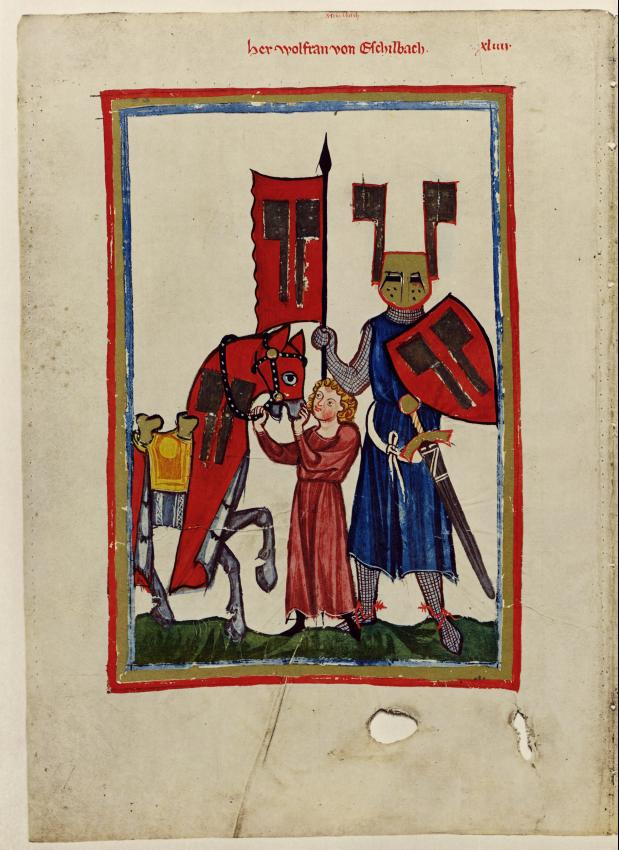 Wolfram von Eschenbach